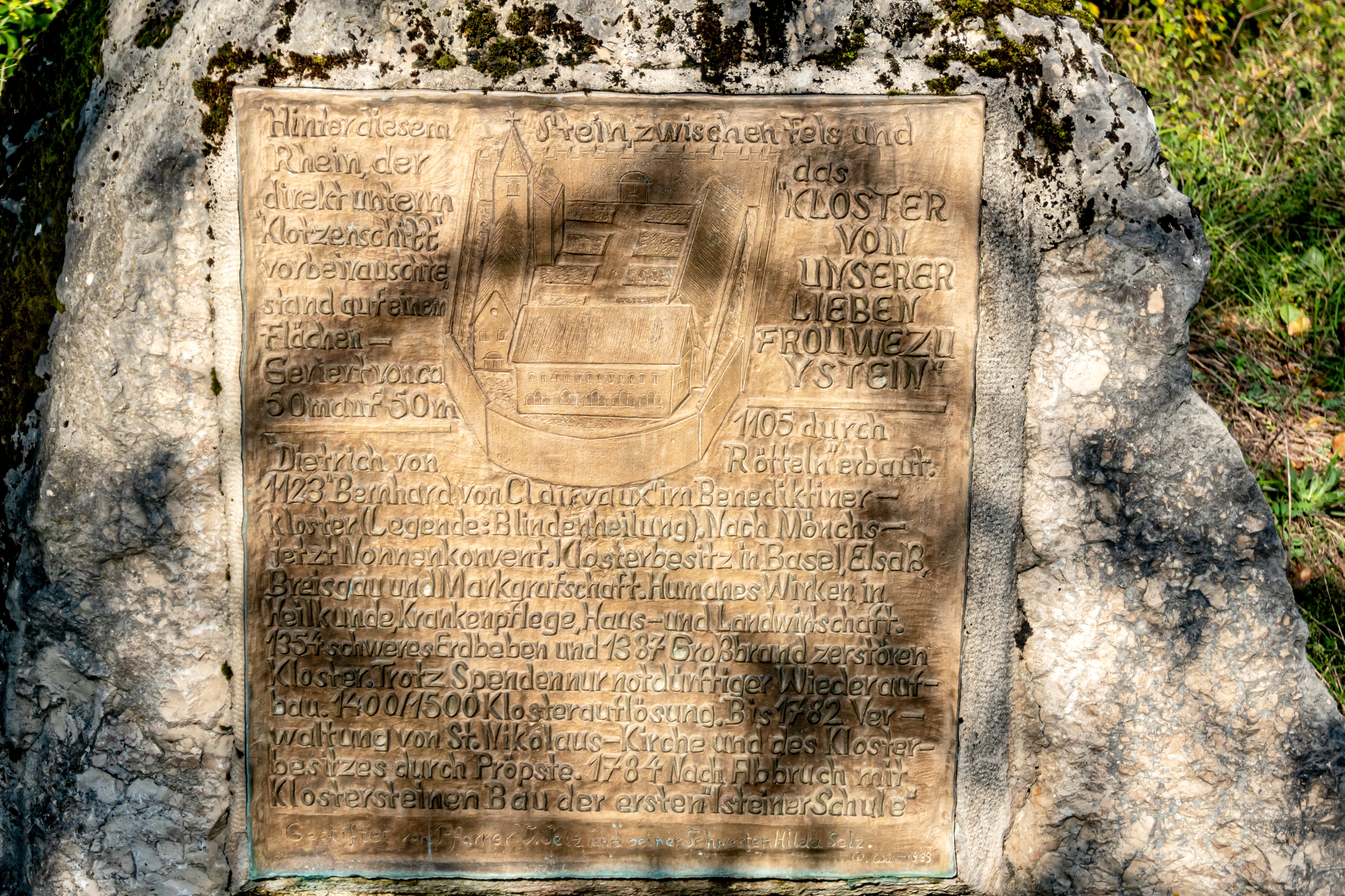 Bilder vom Isteiner Klotz am 20. 10. 2019